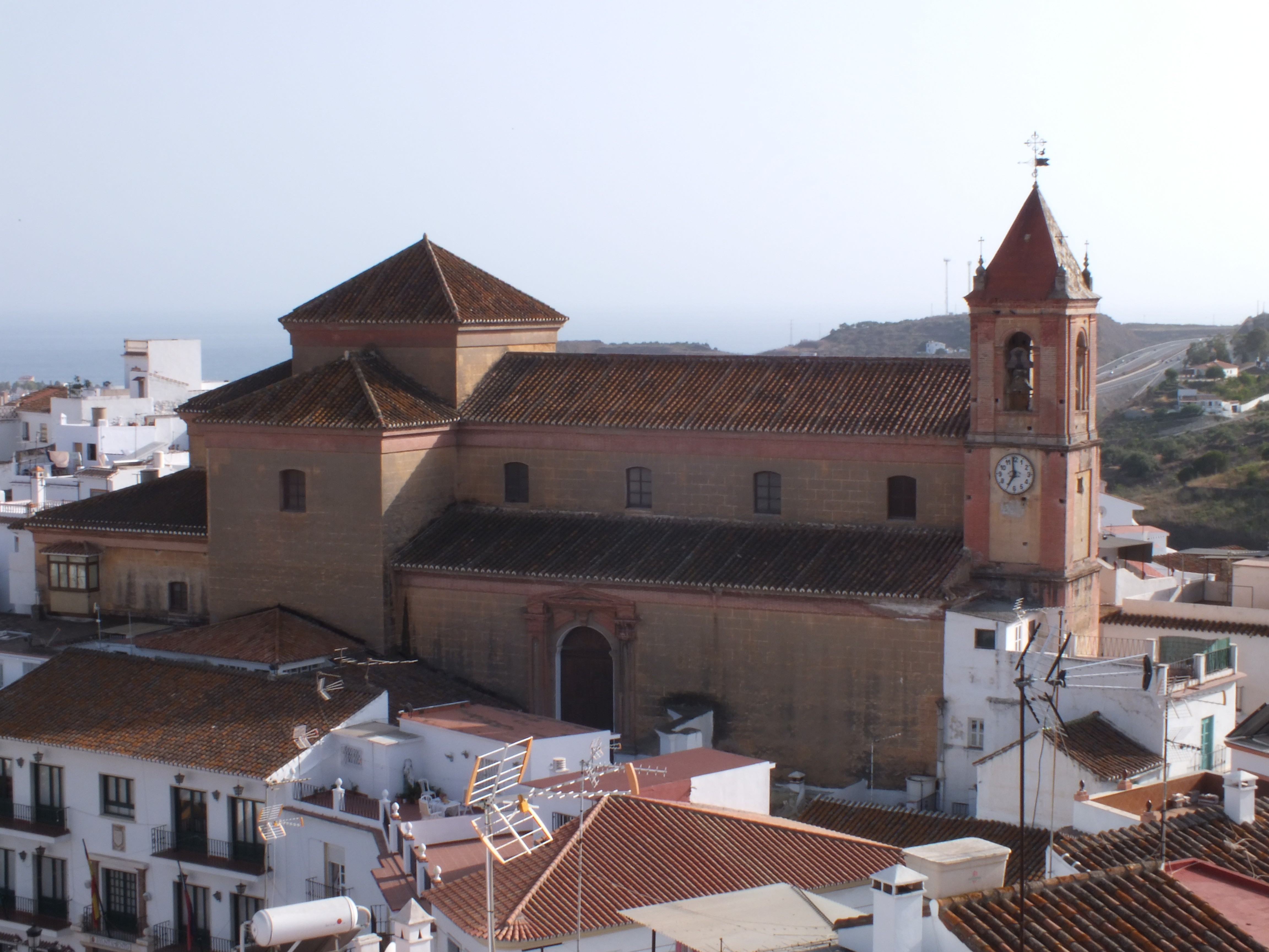 torrox - Malaga